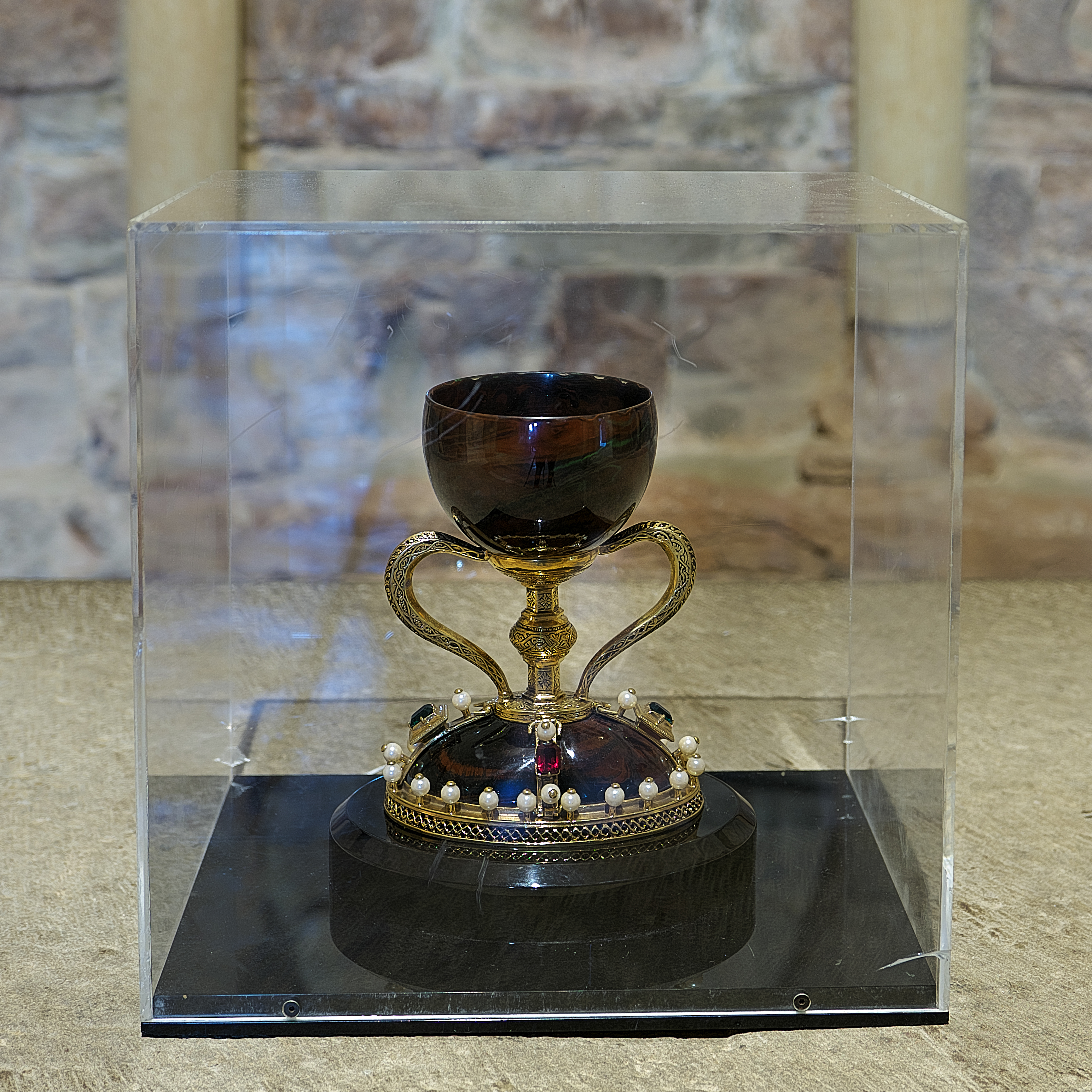 Exposición de réplica del Santo Grial en el presbiterio de la iglesia alta, éste, fue venerado en el monasterio desde 1071 hasta 1399. Procedente del Monasterio San Pedro el Viejo (Huesca), por decisión de Acisclo, obispo de Huesca. Entregado al rey Martín I a finales del siglo XIV.